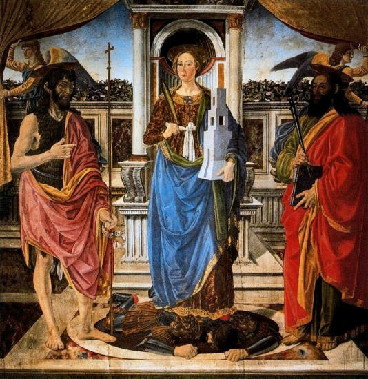 Pala d'altare